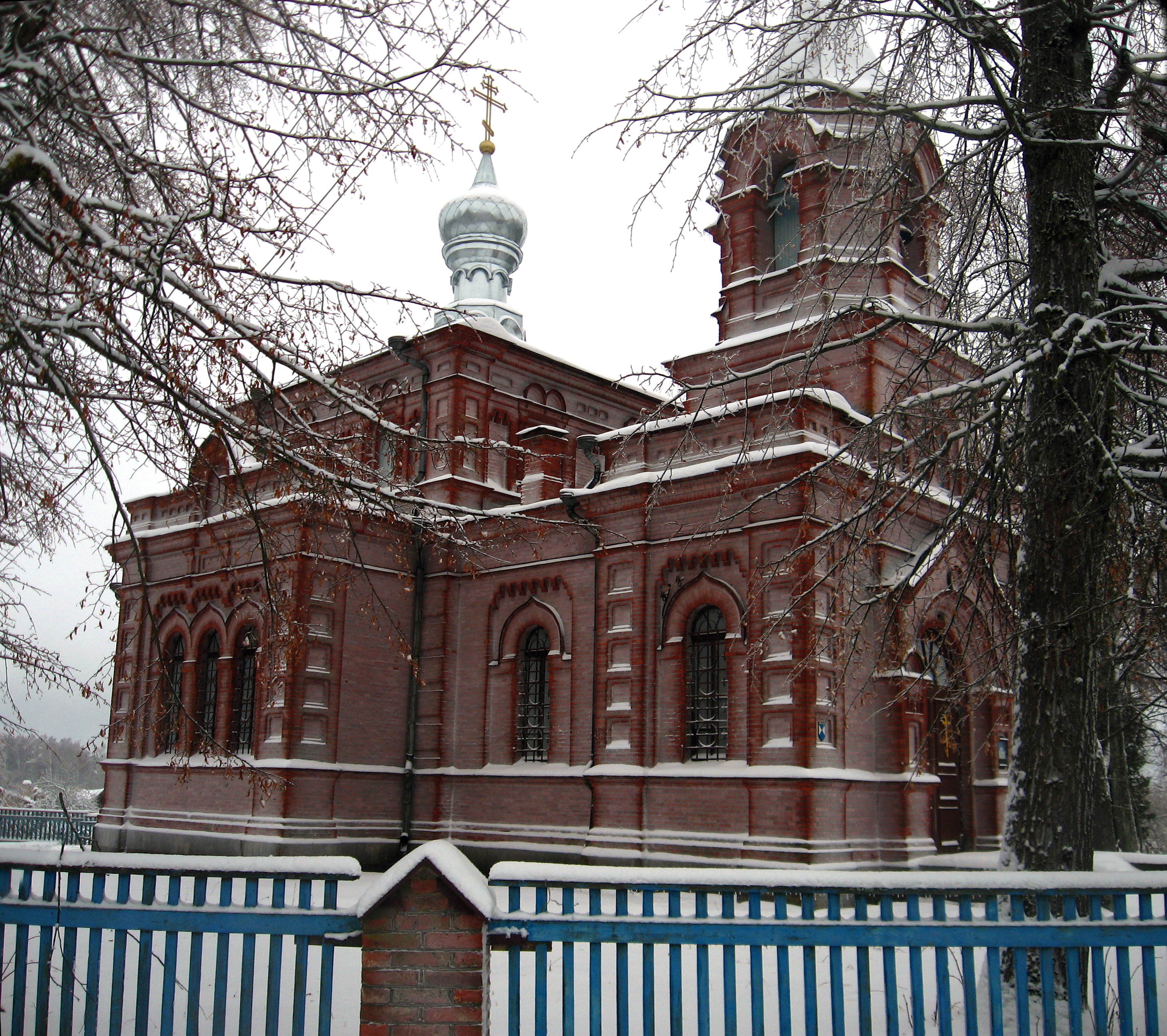 Церковь в Липинишках